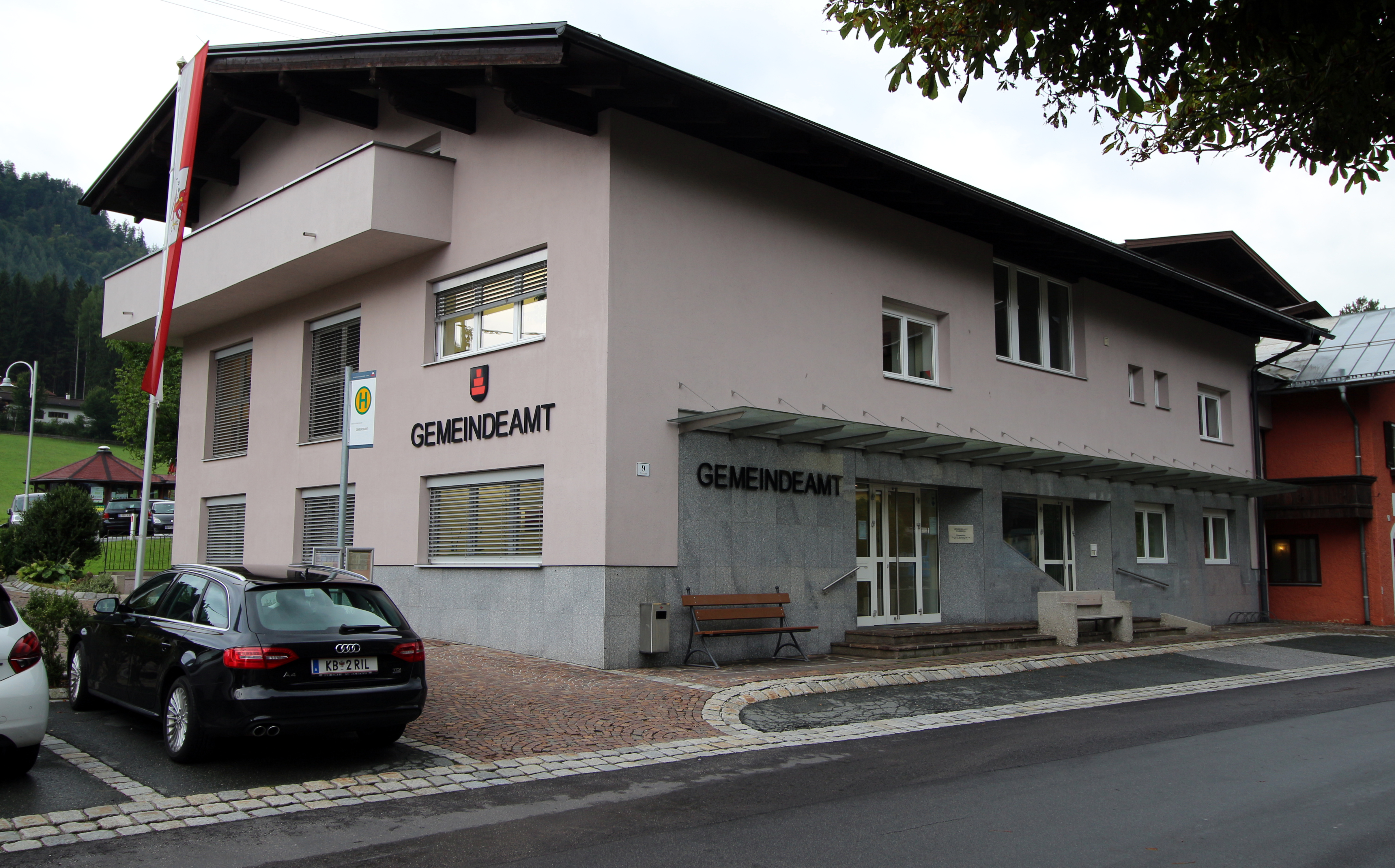 Gemeindeamt der Gemeinde Waidring, Tirol.